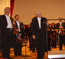 Dieses Bild zeigt Maestro Ervin Acél nach einem seiner letzten Konzerte, die er in der Philharmonie in Oradea dirigiert hat (2005). Acél war u.a. Chefdirigent des Philharmonischen Orchesters Oradea und der Szegeder Philharmonie. Foto aus dem Publikumsbereich des Konzertes.